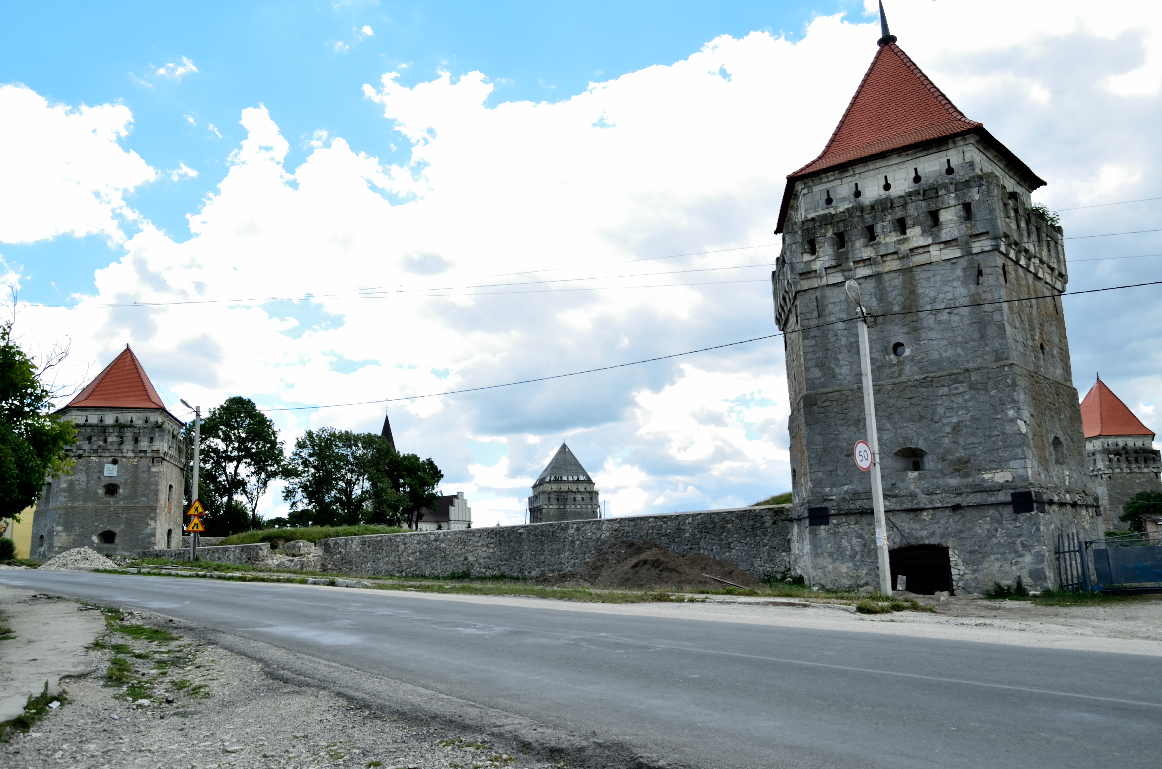 Замок, Скалат